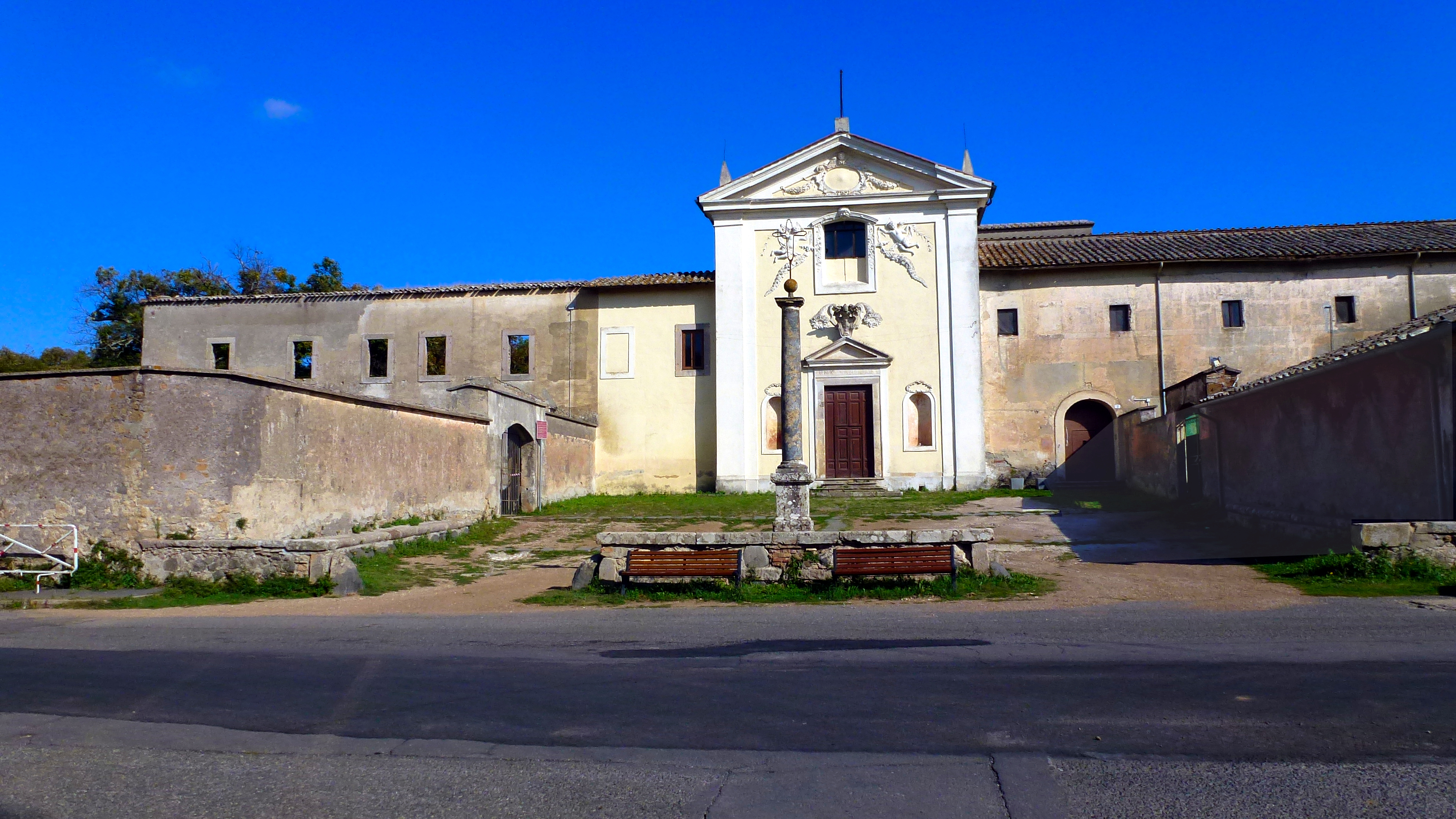 Chiesa e convento Sant'Antonio di Padova, Oriolo Romano